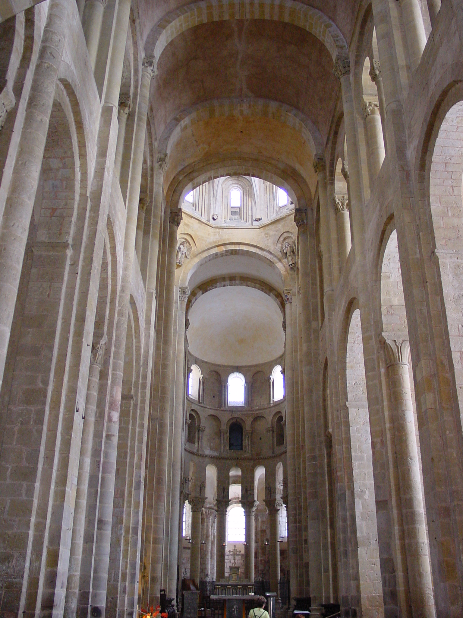 la nef de l'église abbatiale de Conques